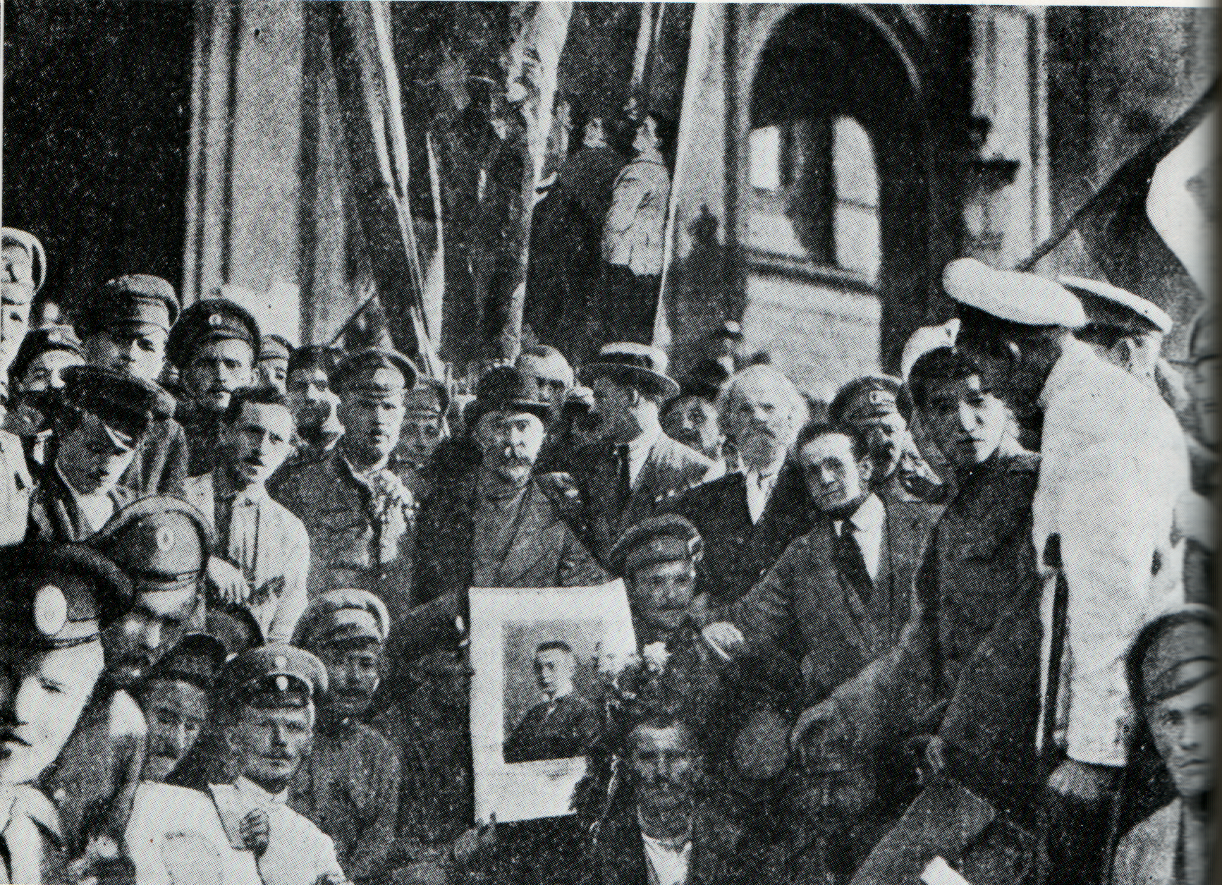 Los socialistas Georgi Plejánov y Lev Deich se manifiestan a favor de la ofensiva militar de junio frente al ministerio de Defensa en Petrogrado, junio de 1917.